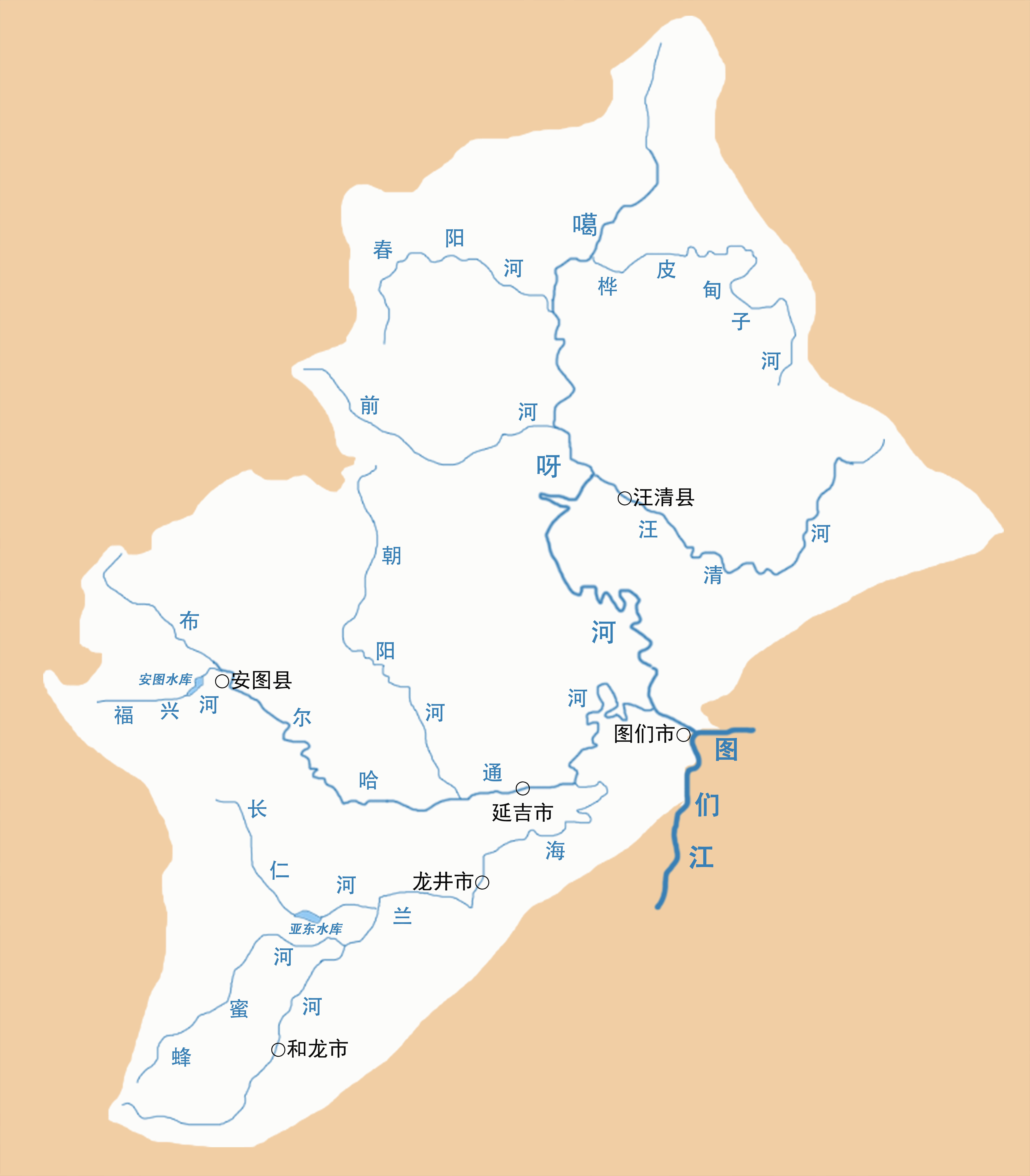 嘎呀河流域图。根据《中国河湖大典·黑龙江 辽河卷》绘制。